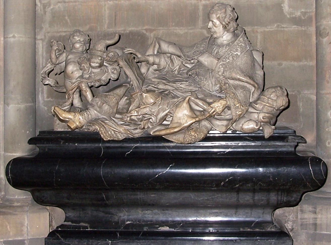 Liebfrauen Trier, Grabmal des Karl von Metternich von Matthias Rauchmüller